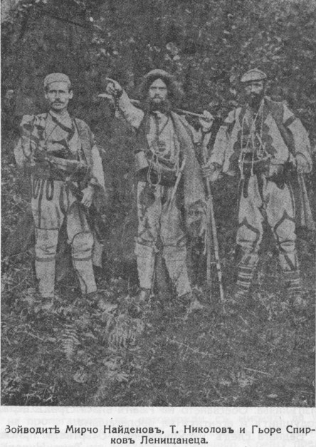 Мирчо Найденов, Тане Николов и Гьоре Спирков